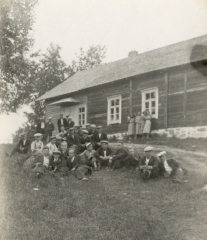 Tšiipakan maamiesseurantalo.